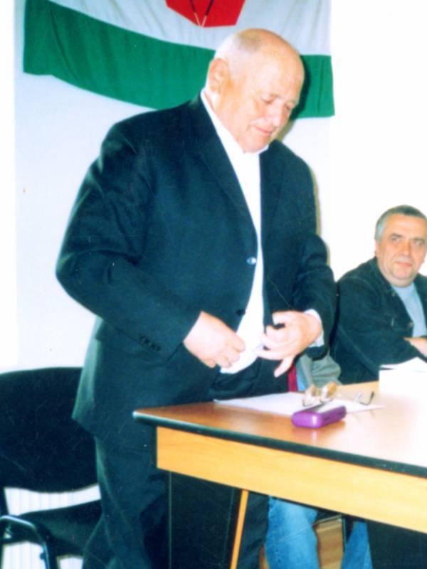 poza facuta la lansarea primului volum